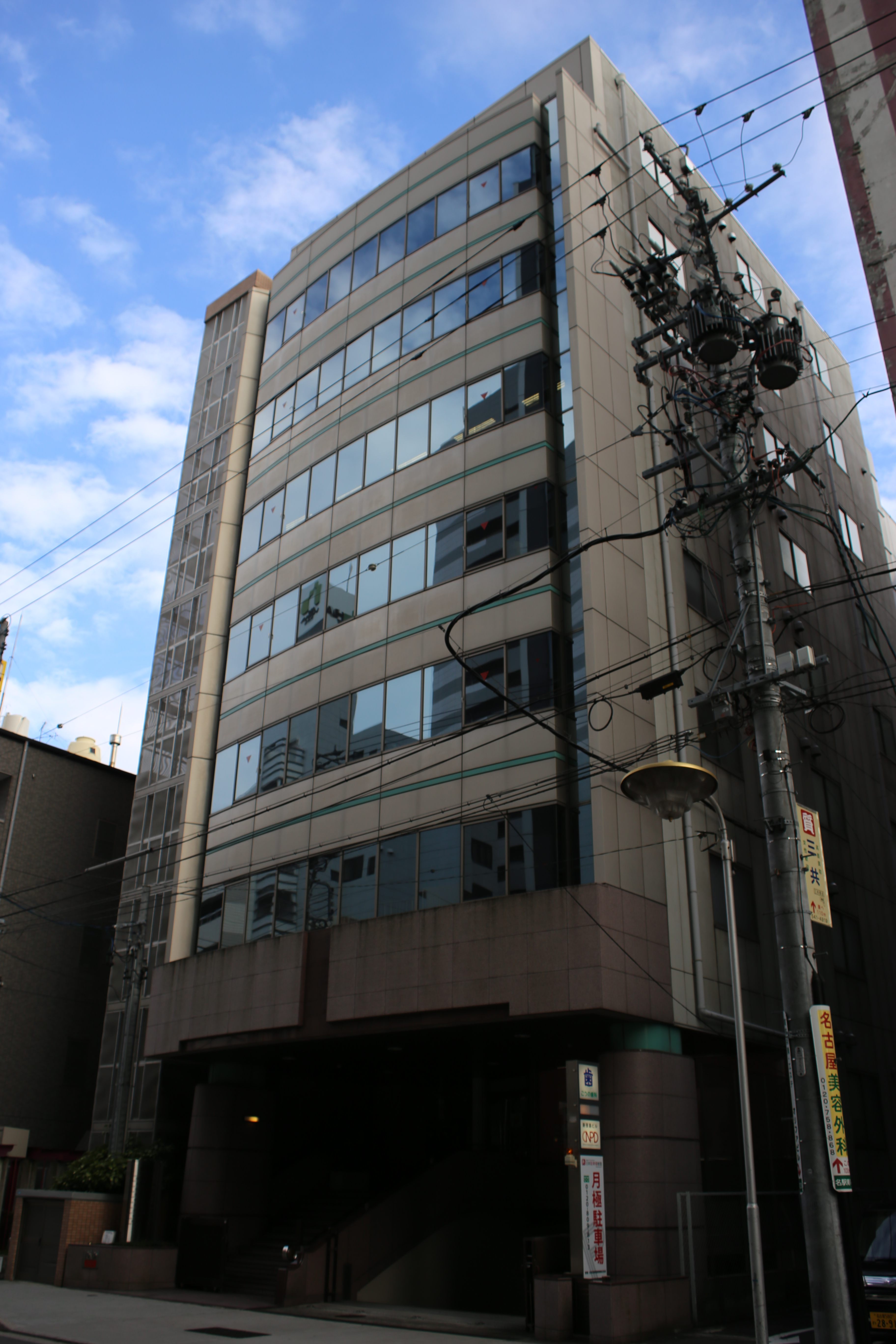 名古屋市中村区名駅南一丁目の新笹島ビルを北側公道西側より撮影